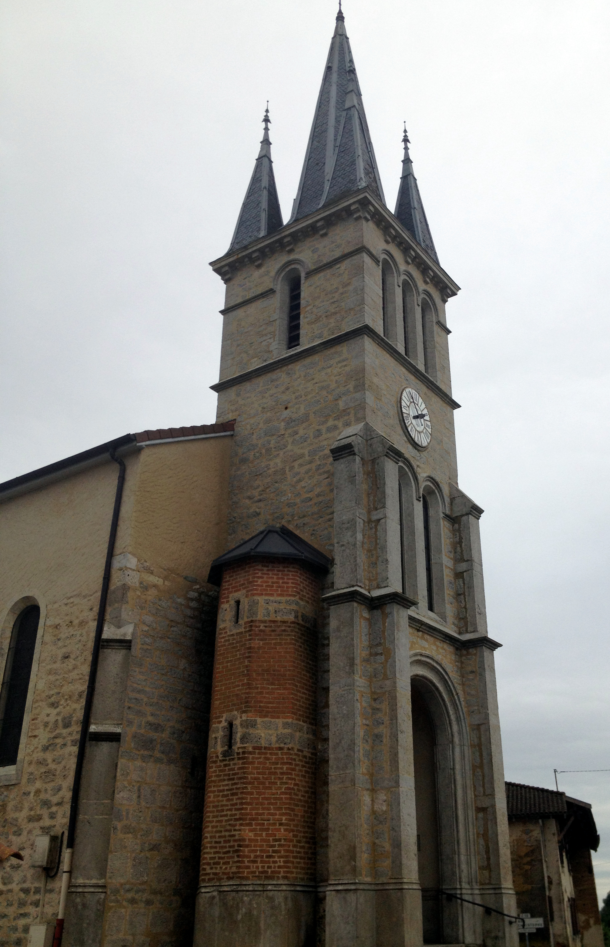 L'église de Faramans (Ain).